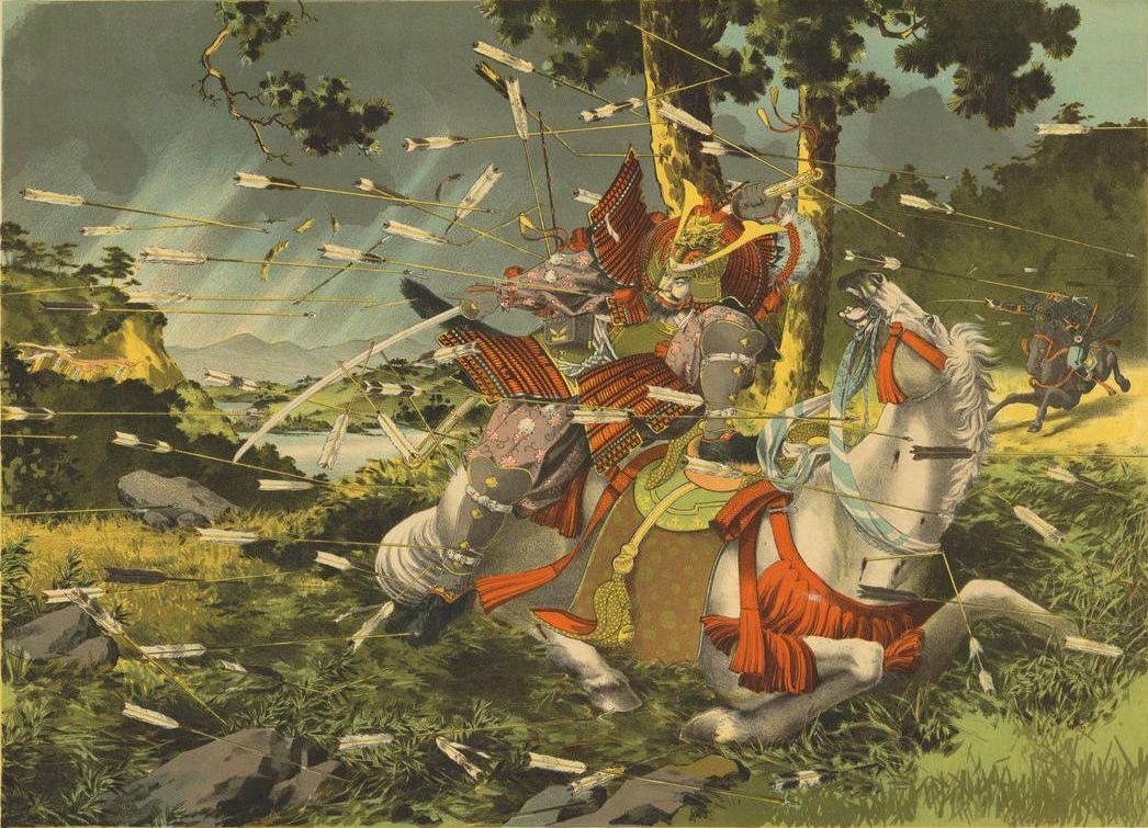 Nitta Yoshisada — 新田義貞